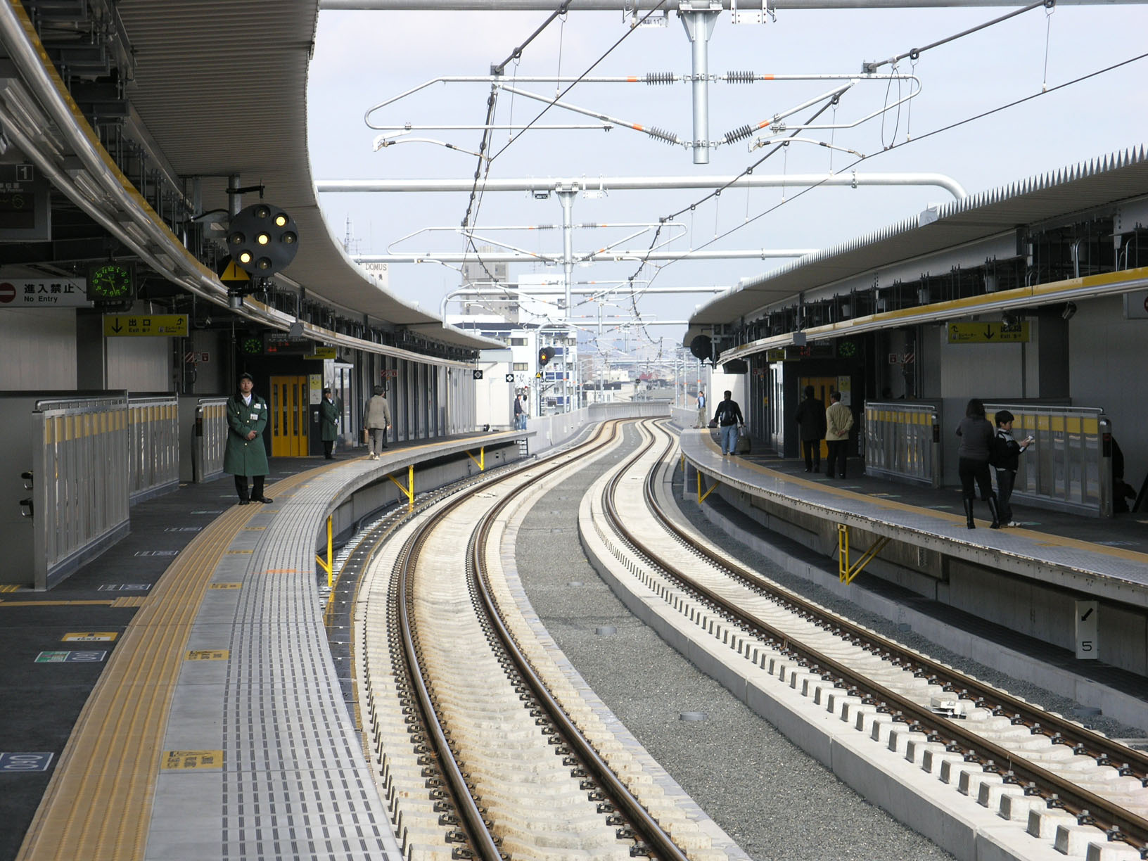 JR新加美駅ホーム 2008年3月撮影。 機材：C-8080WZ 撮影者：Kansai explorer 撮影後リサイズ